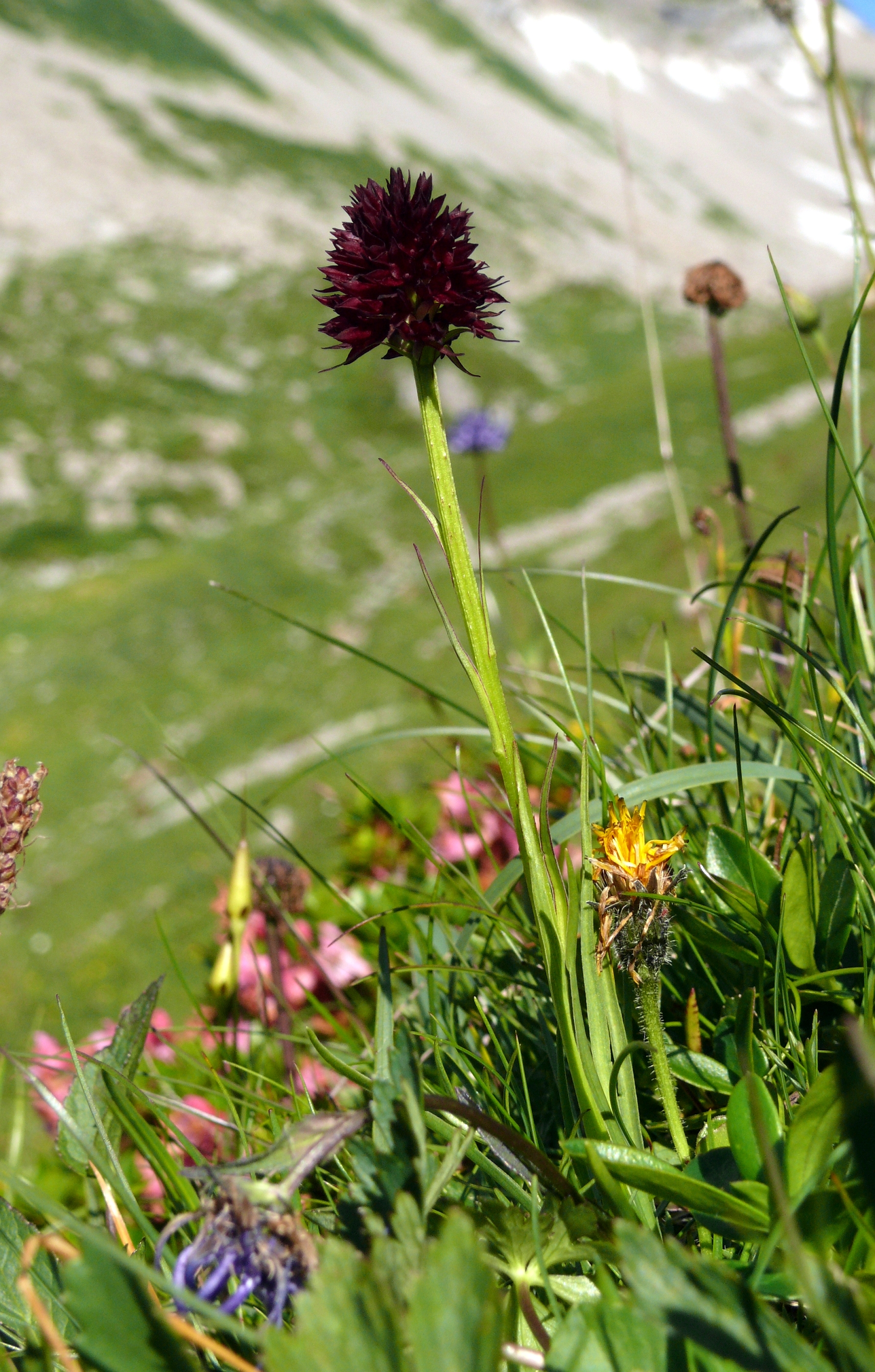 Nigritella rhellicani, Allgäuer Alpen, Österreich